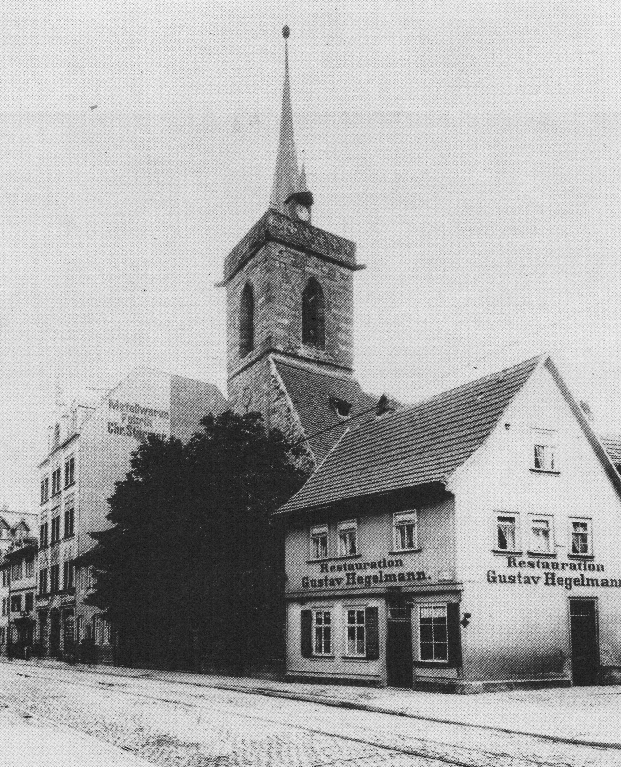 Alte Thomaskirche Erfurt vor dem 1902 erfolgtem Abbruch